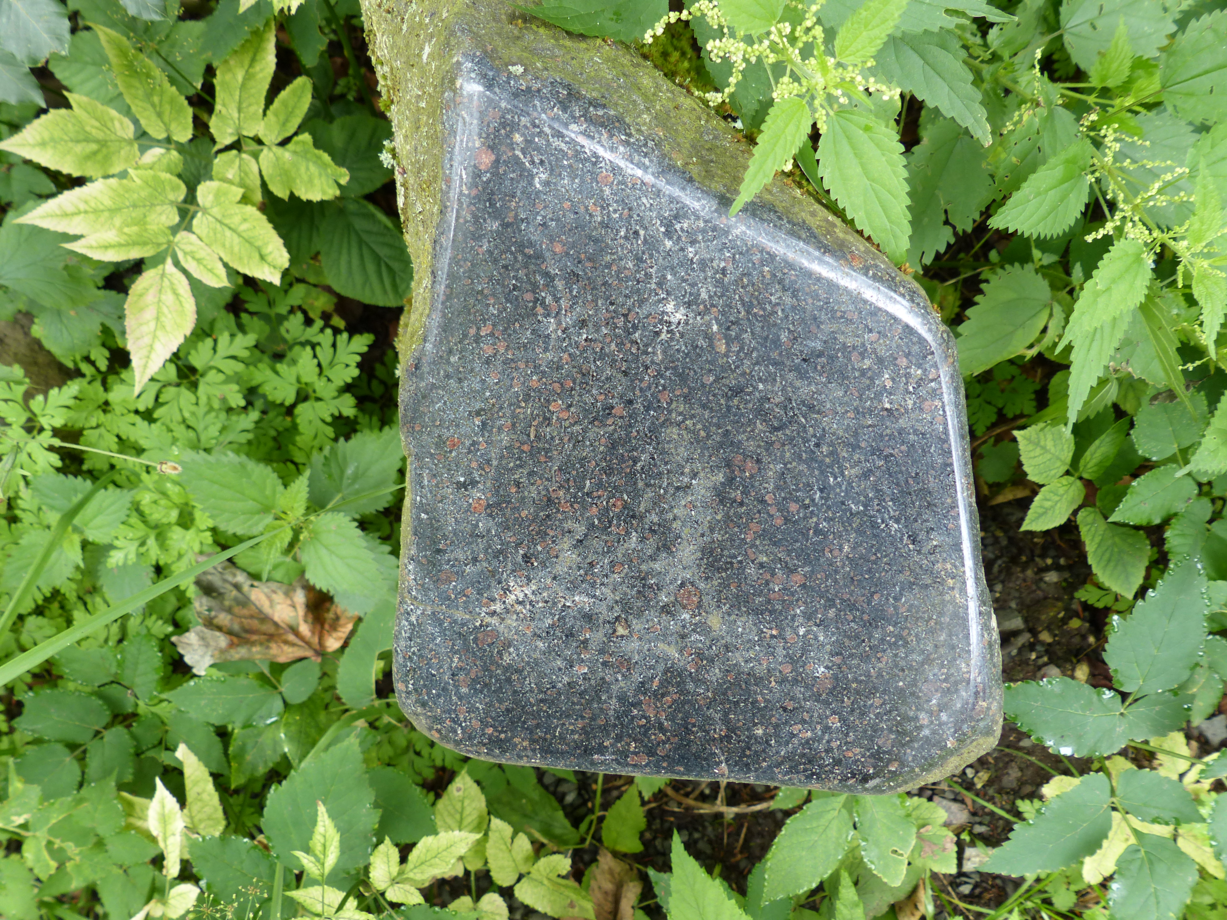 Serie Ansichten vom Weißenstein